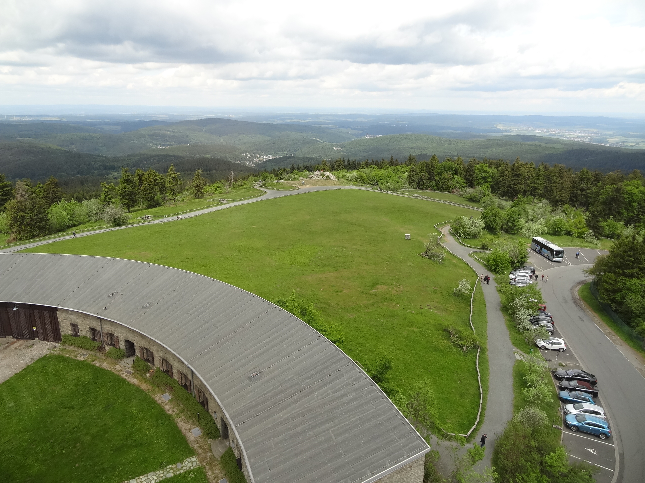 Großer Feldberg